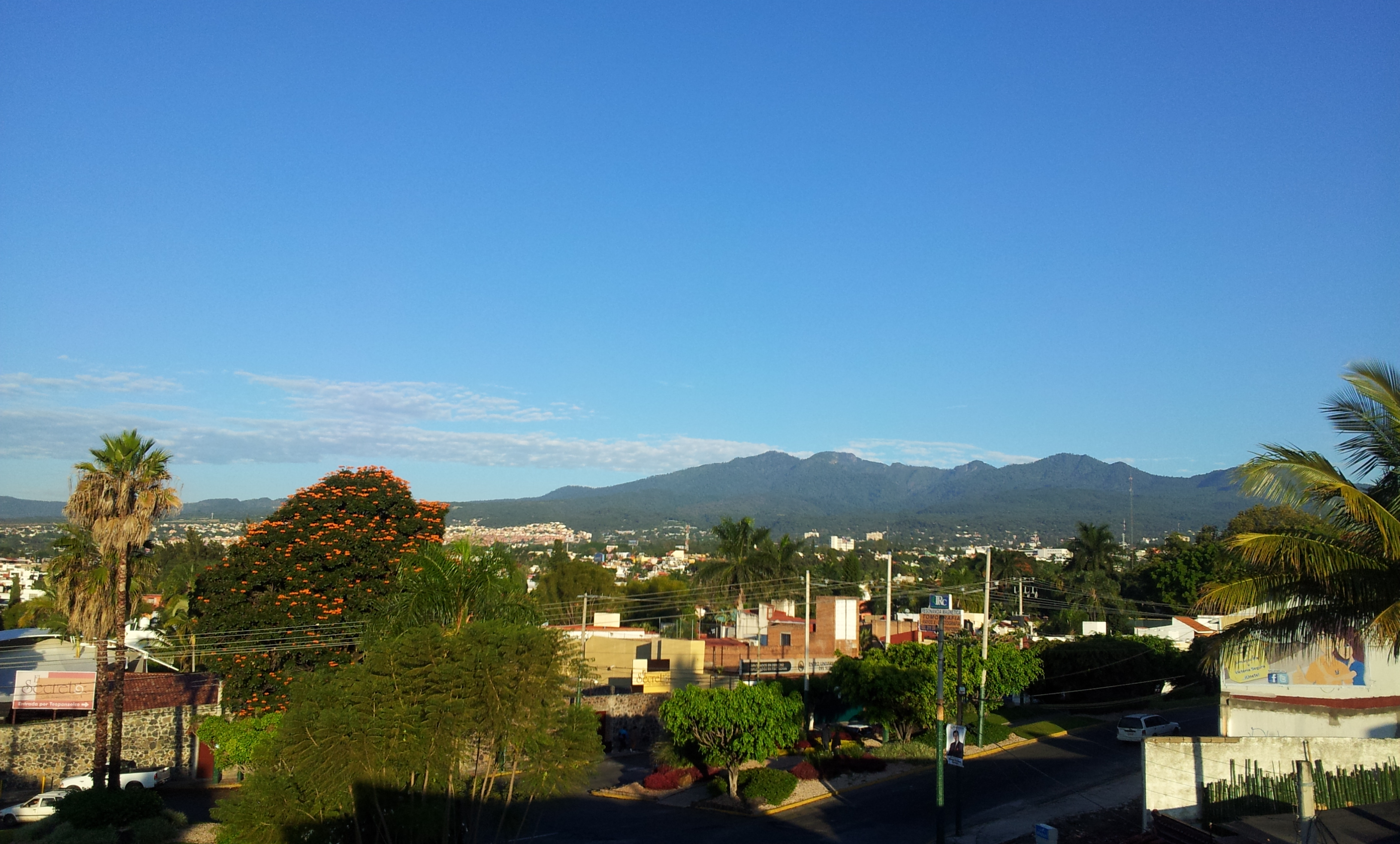 Cuernavaca